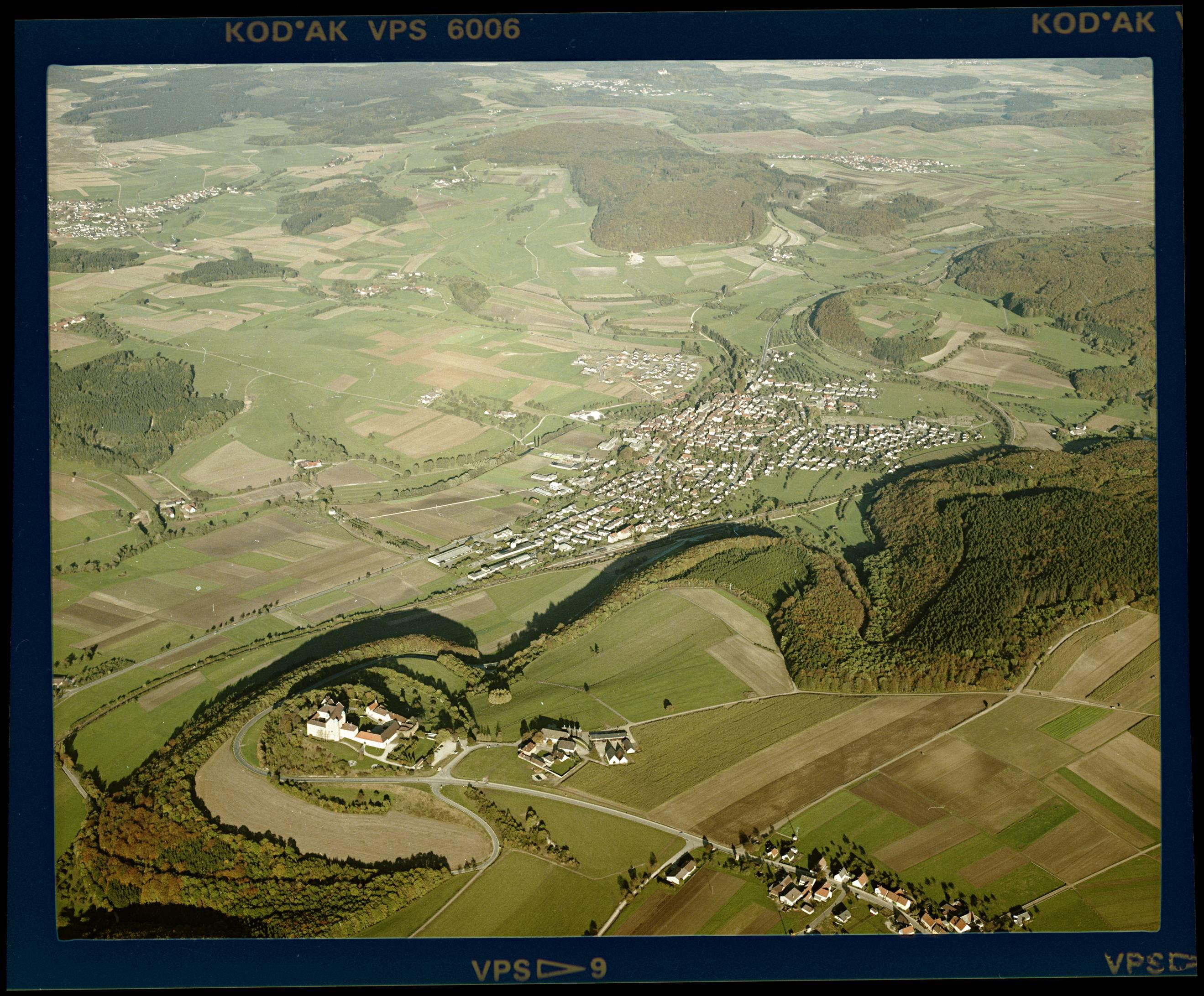 Luftbild von Lauchheim - Staatsarchiv Sigmaringen - Archivalieneinheit N 1/96 T 1 Nr. 588